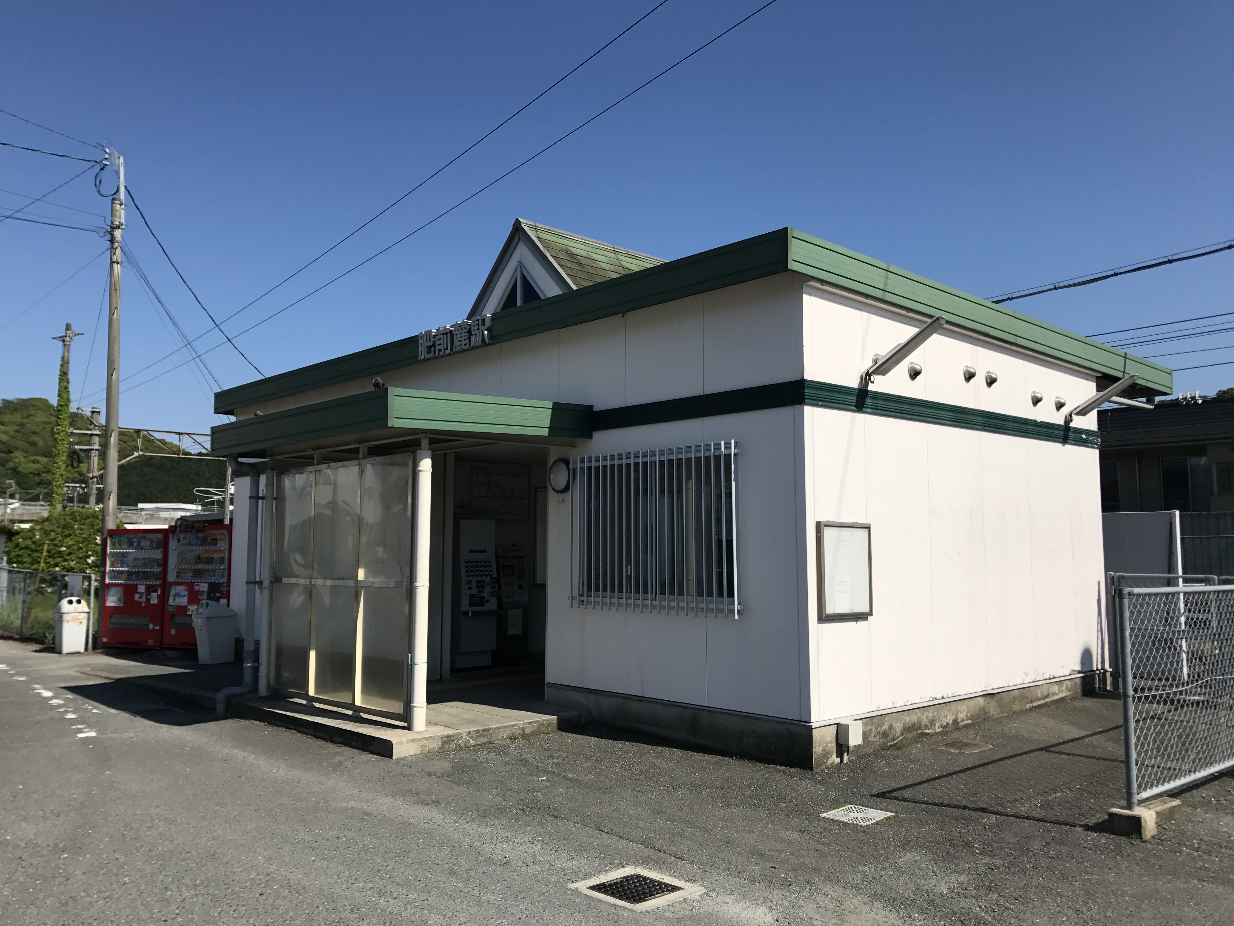 肥前麓駅駅舎